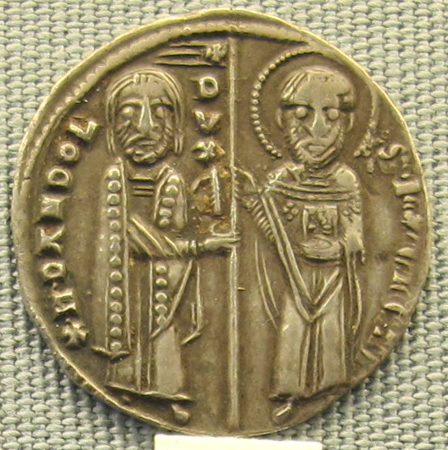 Venezia, grosso da 26 denari (matapan) di enrico dandolo, 1192-1205